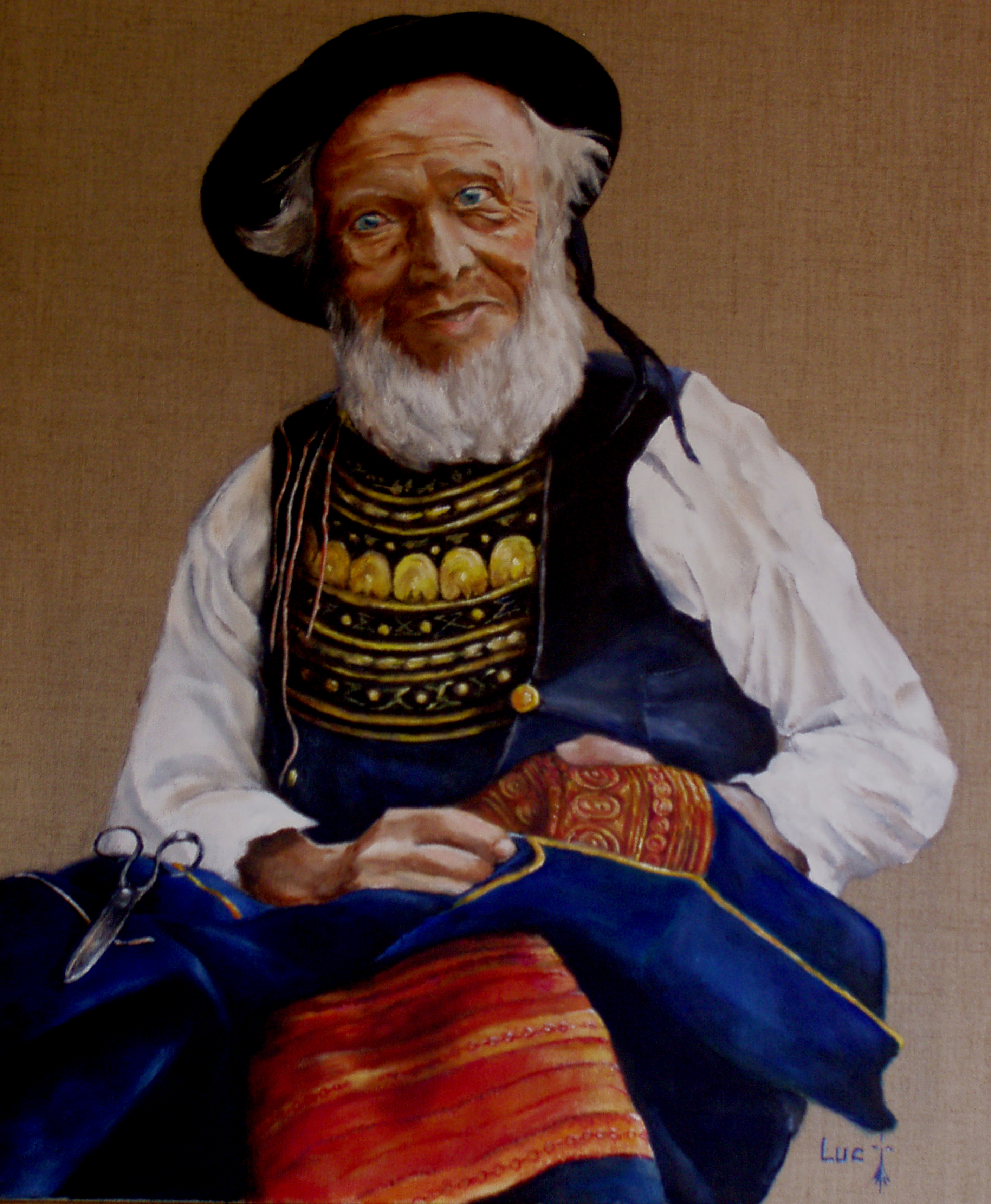 Brodeur de Pont l'Abbé (d'après carte postale ancienne)